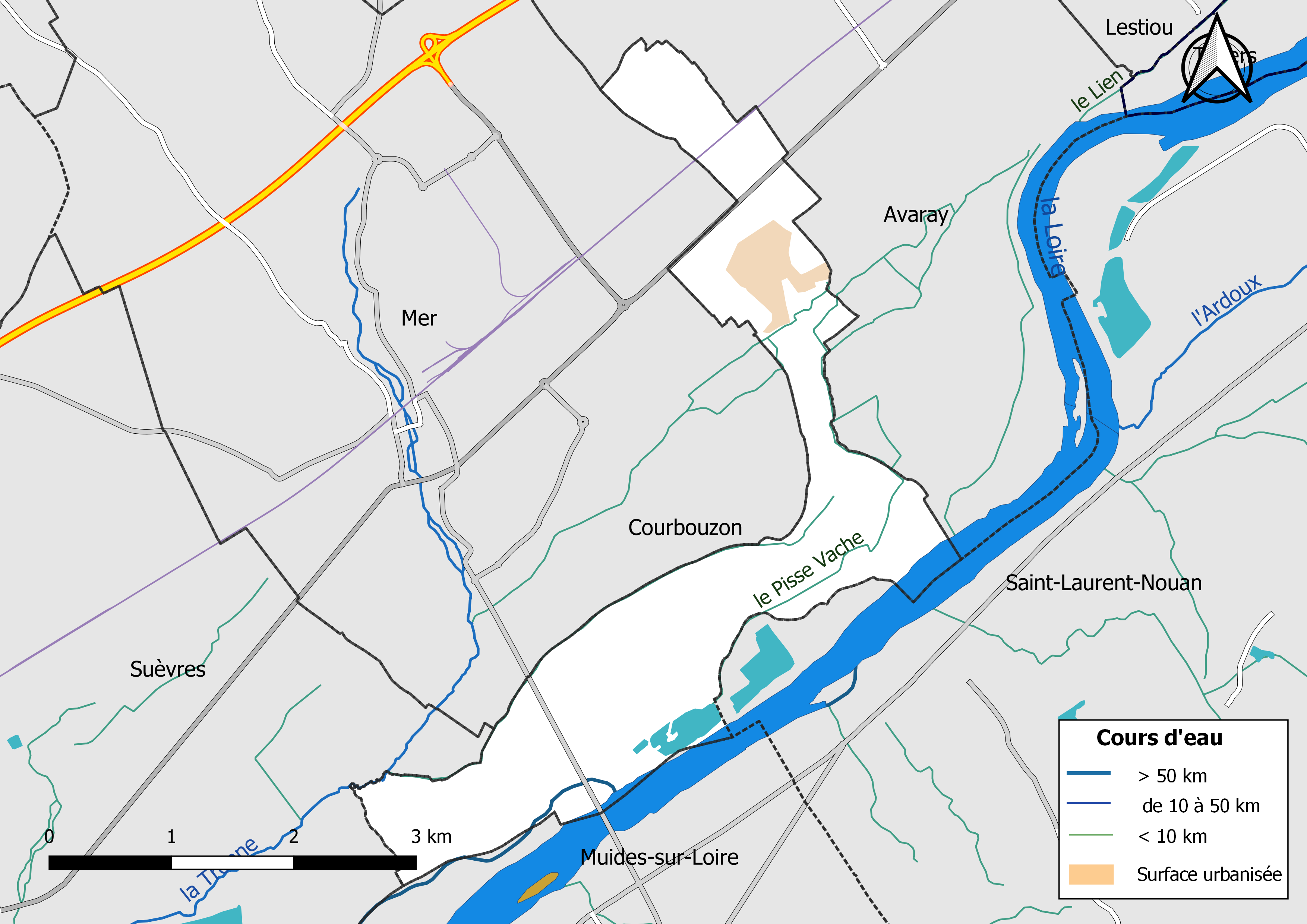 Carte du réseau hydrographique de la commune de Courbouzon (Loir-et-Cher) (France).